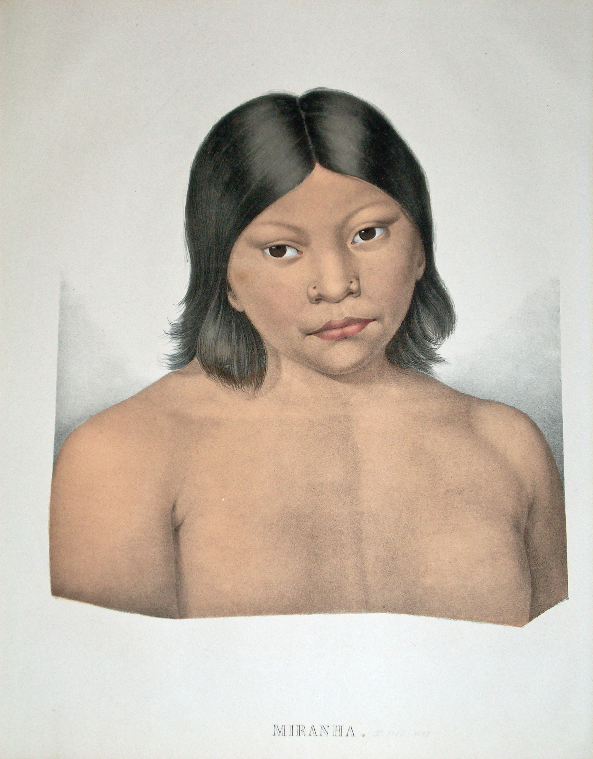 Orignial-Dateien der Digitalisierung von Spix' Reiseatlas (1823-1831 Reise in Brasilien auf Befehl Sr. Majestät Maximilian Joseph I. König von Baiern in den Jahren 1817-1820 gemacht und beschrieben - Atlas)